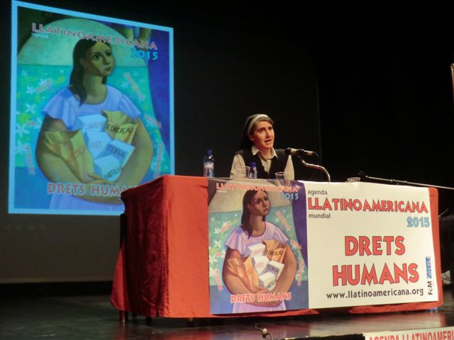 Fotografía tomada durante la presentación de la agenda latinoamericana en Girona. En la fotografía aparece Teresa Fordades.